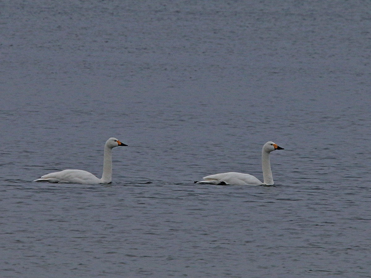 Zwergschwäne in Mecklenburg